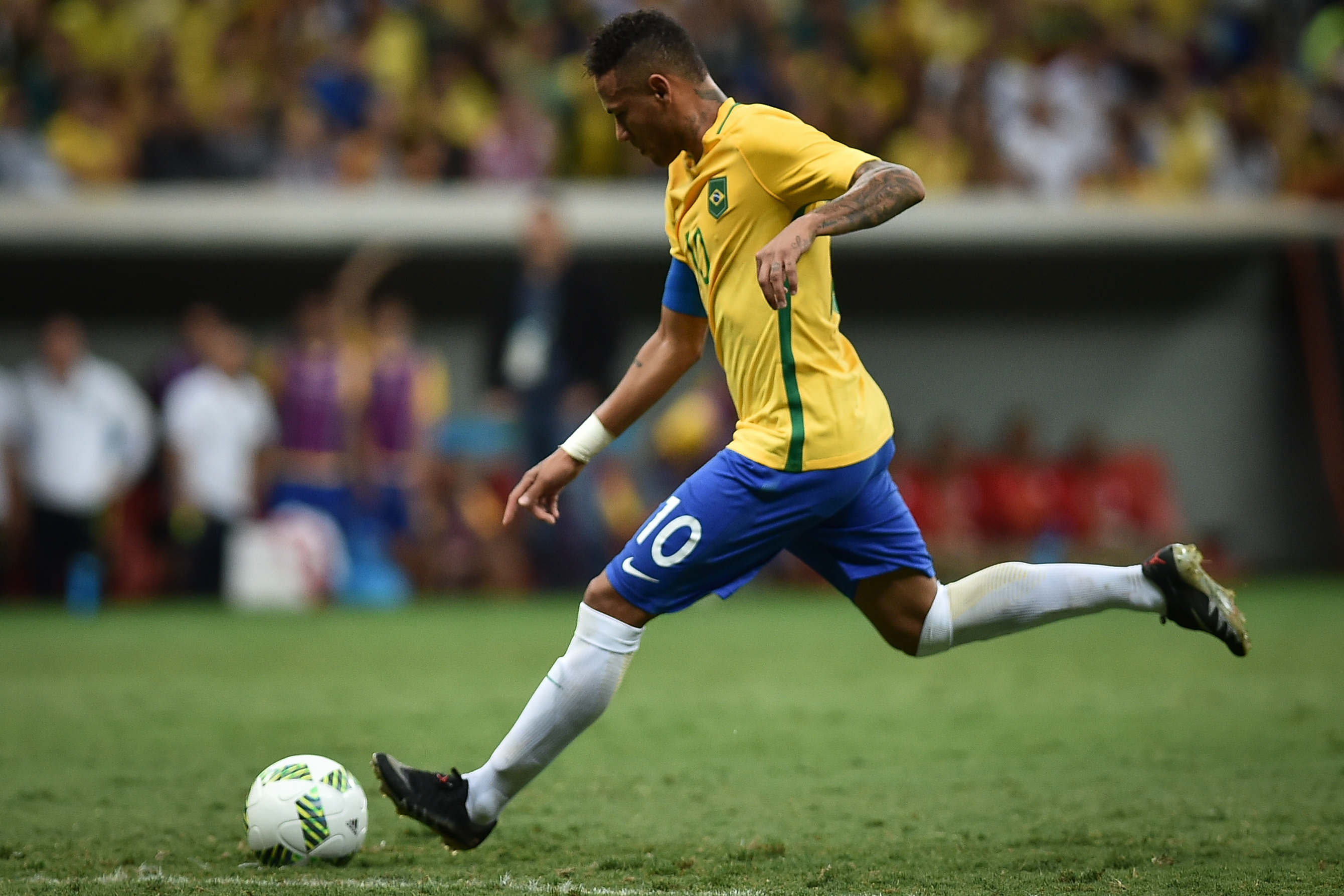 Estádio Nacional de Brasília Mané Garrincha, Brasília, DF, Brasil, 7/8/2016 Foto: Andre Borges/Agência Brasília. Brasil e Iraque jogam neste domingo (7), no Estádio Mané Garrincha, pelo grupo A do futebol masculino nas Olimpíadas 2016.